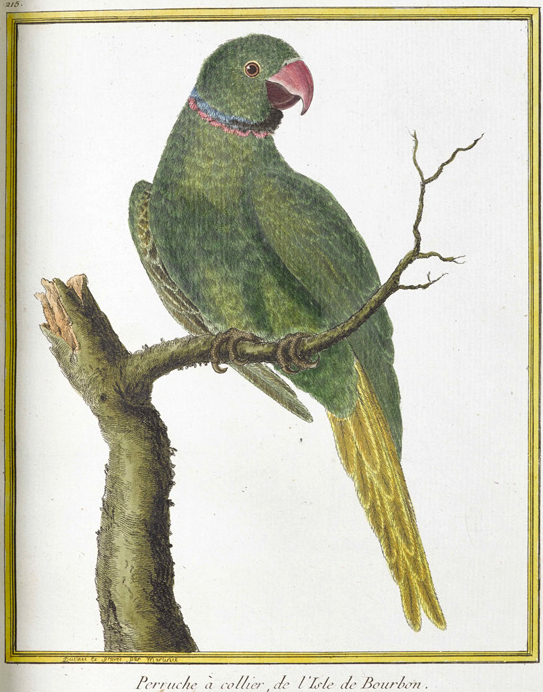 Type illustration of Psittacula eques eques.